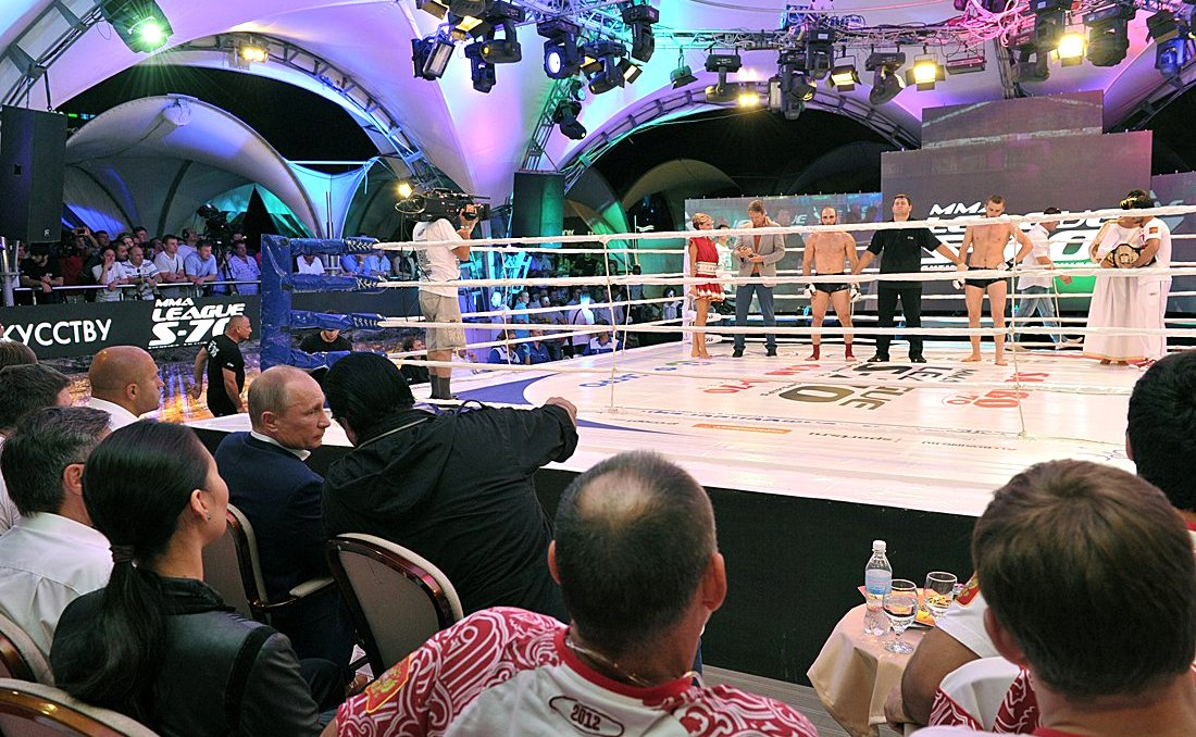 Плотформа S-70, финал чемпионата России в среднем весе, на ринге Адам Халиев и Магомед Магомедкеримов